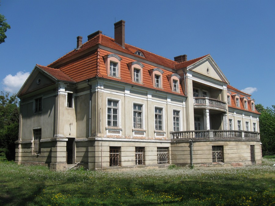 Chocicza - pałac